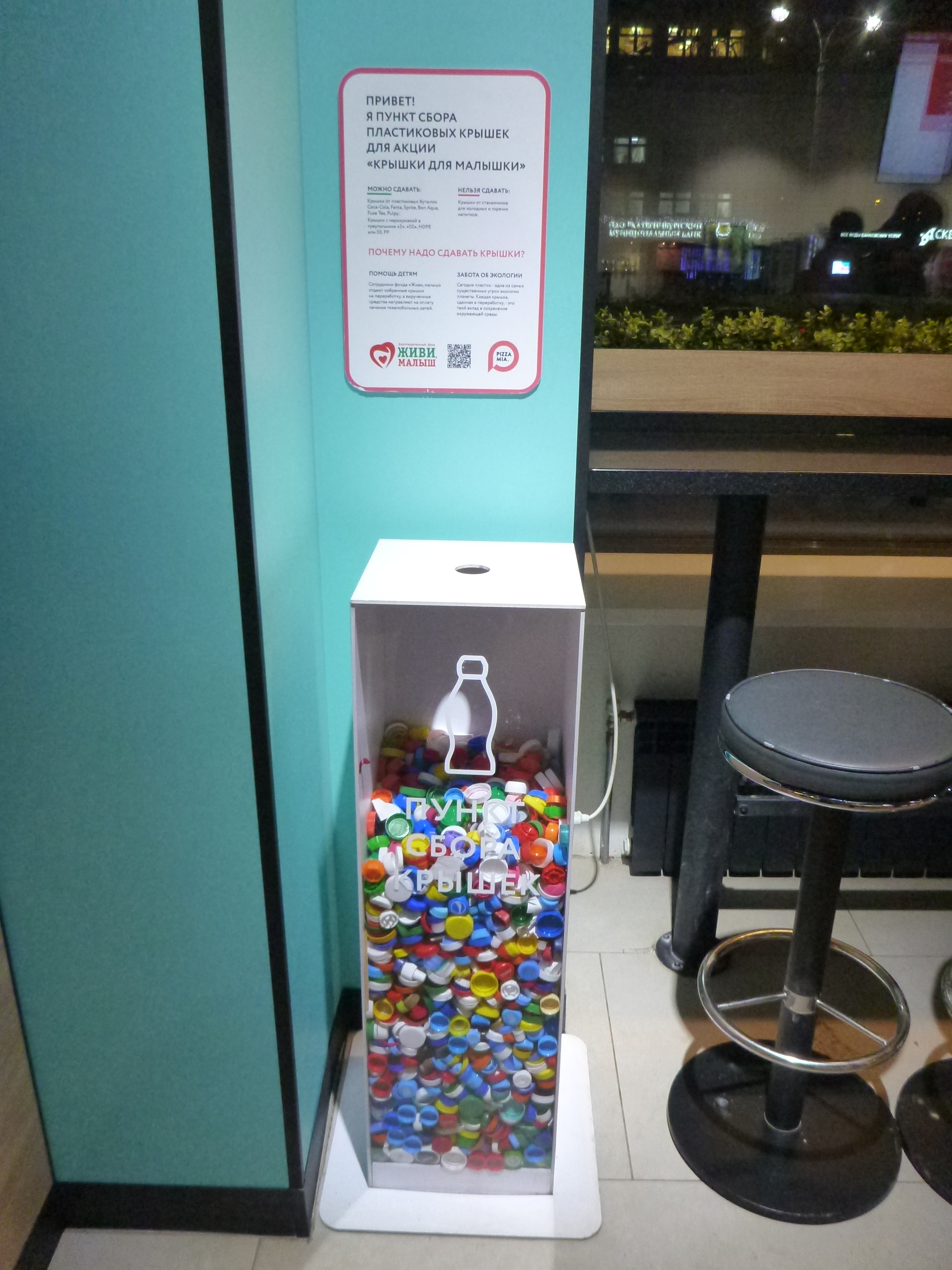 Пункт приема крышек для пластиковых бутылок в Пицца миа в Екатеринбурге 2020 год